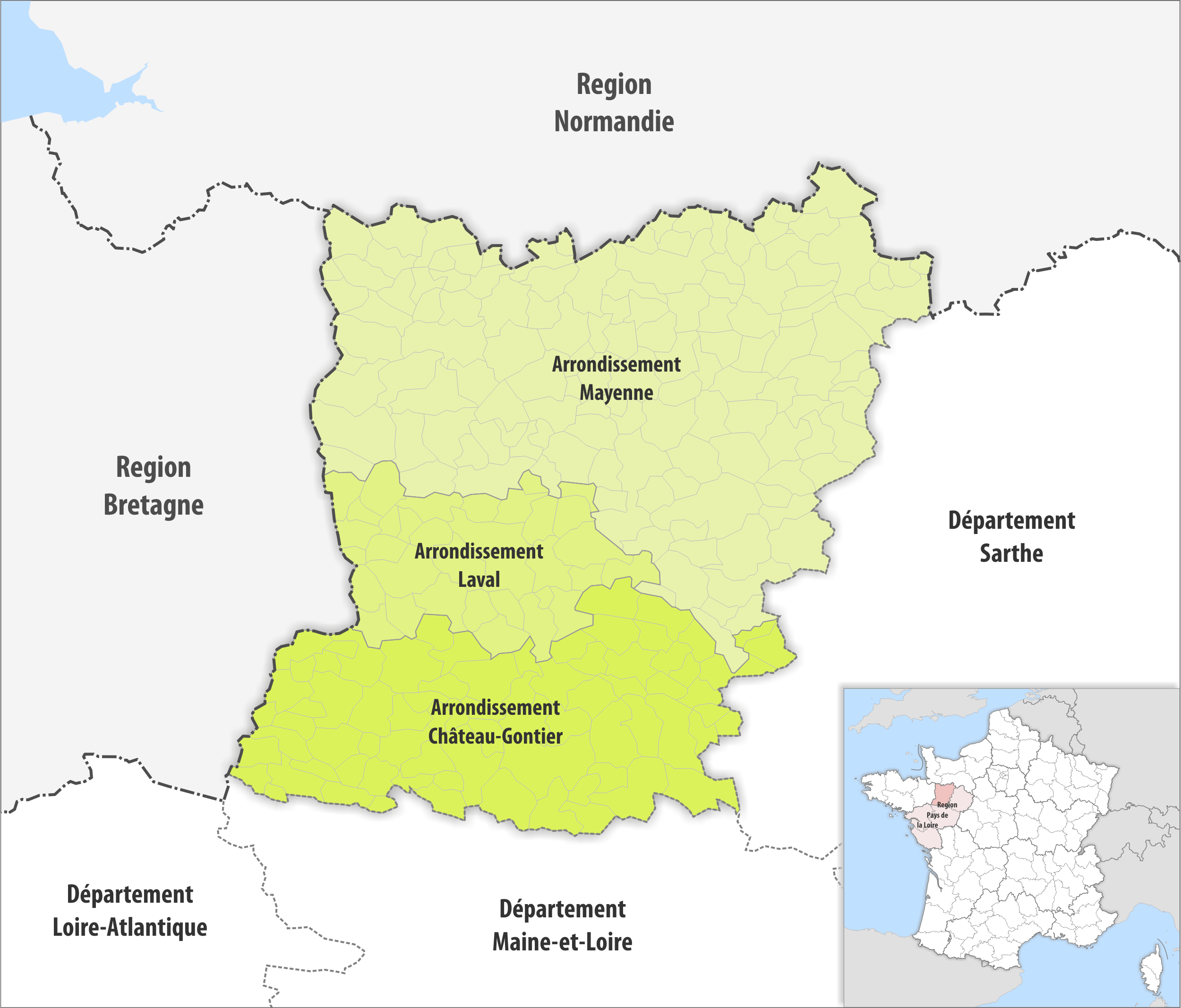 Gemeinden und Arrondissemente im Departement Mayenne